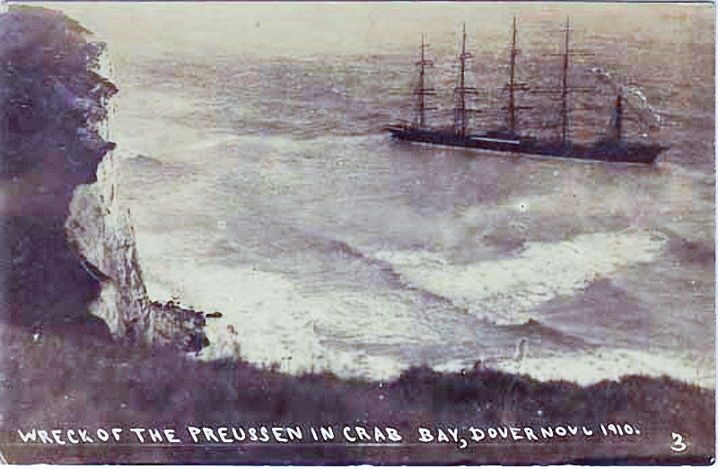 Die Preussen nach ihrer Strandung in der Crabbay. Der "PREUSSEN" kam in der Nacht des 5. November 1910 im Kanal in der Nähe von Dover der englische Turbinen-Dampfer "BRIGHTON" in die Quere. Die "BRIGHTON" war laut Bailey das erste Dampfturbinenschiff auf dem Englischen Kanal ("first turbine channel steamer"), es war Nacht und es gab wohl auch Nebelbänke. Jedenfalls "stieß zusammen, was zusammenstoßen musste": Das schnelle Fünfmastvollschiff "PREUSSEN" und der schnelle Turbinendampfer "BRIGHTON". Sozusagen, deutsches Segel-Hi-Tech versus britisches Dampfturbinen-Hi-Tech. Auf beiden Kommandobrücken hat man wohl damals die Geschwindigkeit des anderen unterschätzt, wobei, wenn man sich die alten Fotos anschaut, die "PREUSSEN" auf die "BRIGHTON" drauffuhr. Aber sie hatte ja das Vorfahrtrecht! Dabei brachen Bugspriet und der Fockmast. Funk gab es angeblich damals noch nicht an Bord der beiden Schiffe. Deshalb machte sich die "BRIGHTON" auf in Richtung Newhaven und alarmierte dort den Schlepper "ALERT", der die "PREUSSEN" auf den Haken nahm und versuchte, sie nach Dover zu schleppen. Der Schlepper war wohl ziemlich schwach, das Wetter schlecht und die "PREUSSEN" warf Anker vor Dover. Aber beide Ankerketten brachen und das Fünfmastvollschiff trieb am 6.11.1910 in der Crab Bay auf den felsigen Strand vor den Klippen von Dover und ging verloren. Die Besatzung kam sicher an Land. In einigen Haushalten von Dover soll es noch heute manch gut erhaltenes "Erinnerungsstück" von Bord der "PREUSSEN" geben. Das Wrack - jedenfalls ein oder zwei Maststümpfe davon - ist angeblich auch heute noch bei Niedrigwasser vor Dover sichtbar.